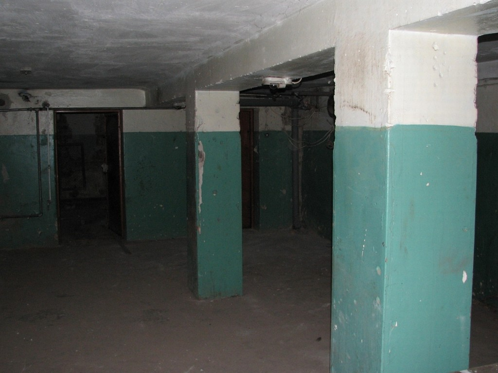 Częściowo przygotowane ukrycie schronowe w piwnicy budynku mieszkalnego przeznaczone do ukrycia 184 osób, wytrzymałość stropu 0,04 MPa, rok budowy 1936